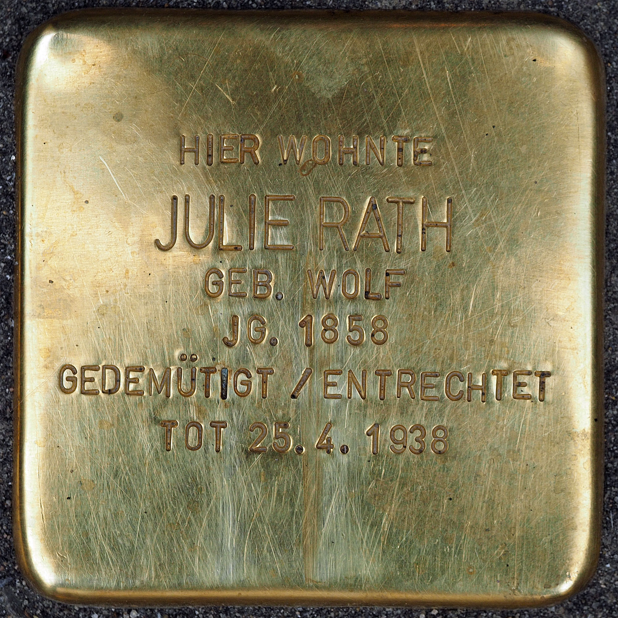 Stolpersteine Kempen: Rath, Julie